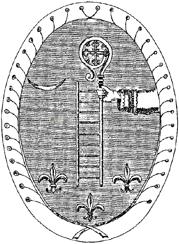 Sceau médiéval de l'abbaye cistercienne des Écharlis (Yonne)